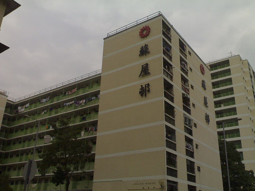 A building of So Uk Estate, Hong Kong.